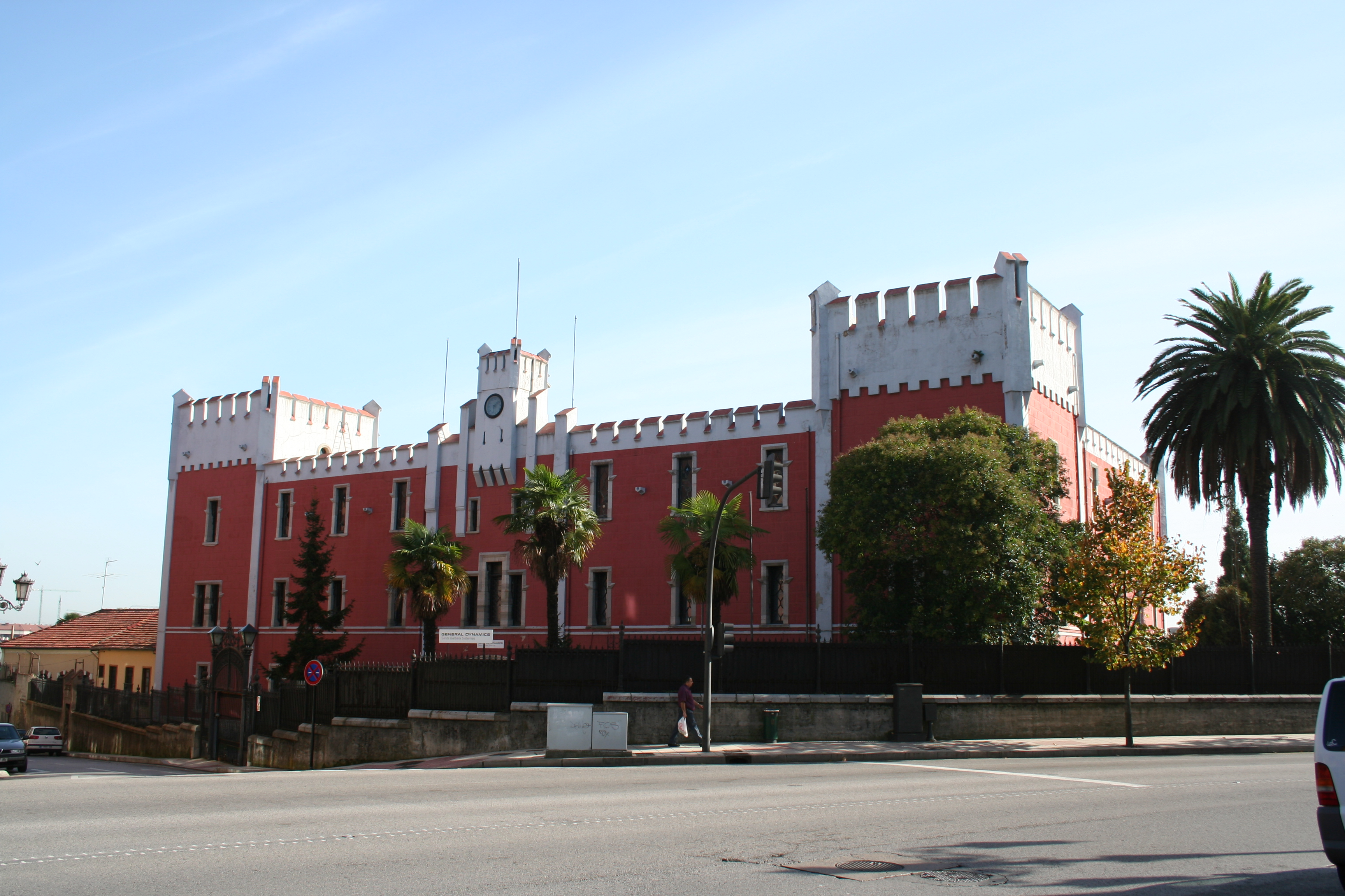 Fábrica de Armas de la Vega en Oviedo (España)